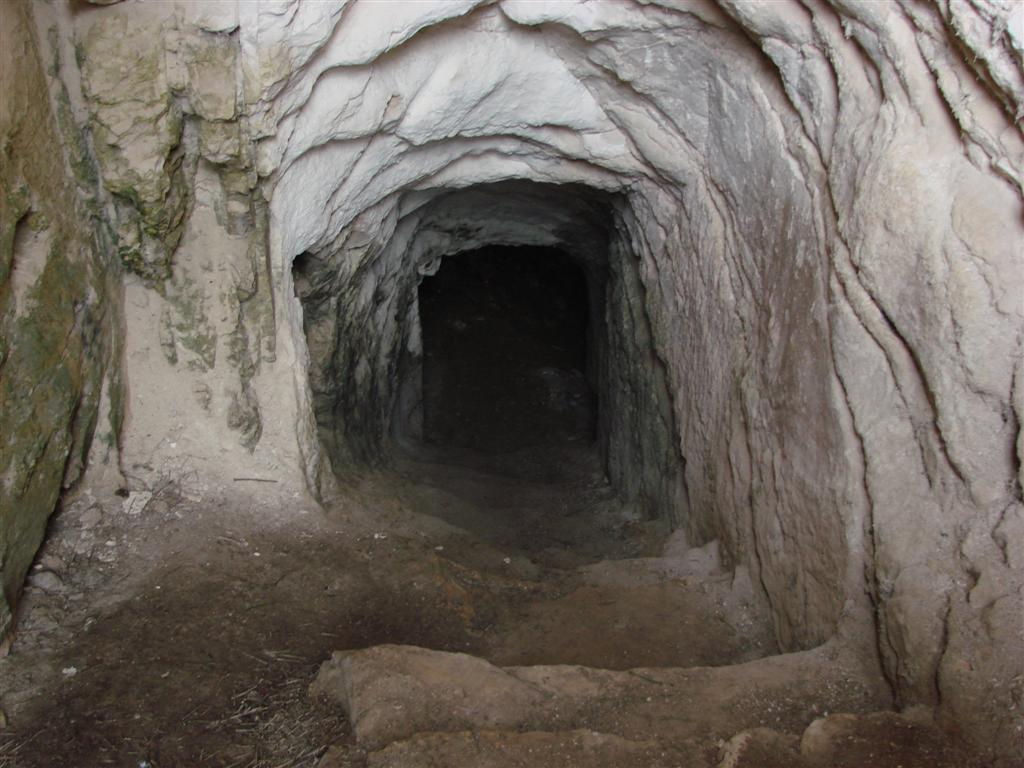 מערת האסורים בנחל אדוריים